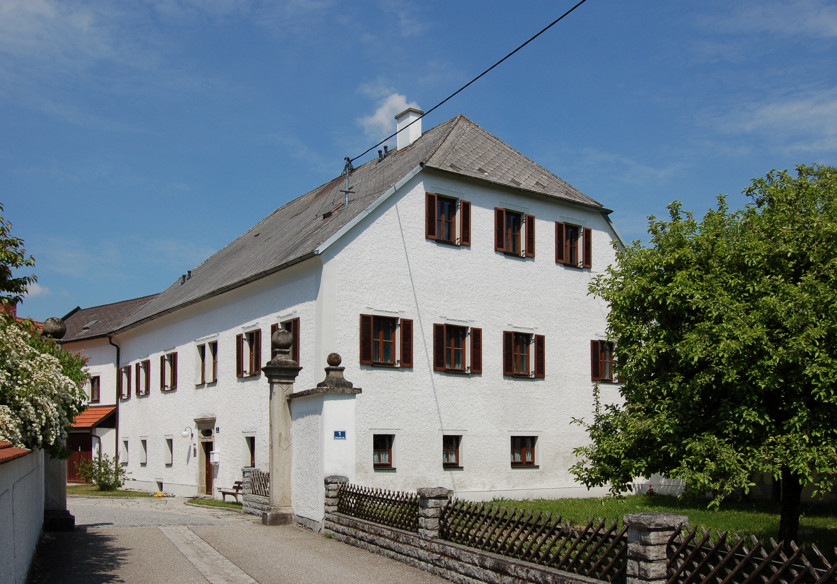 Der denkmalgeschützte Pfarrhof in Kleinzell im Mühlkreis, Oberösterreich. Der Pfarrhof der Kleinzeller Pfarrkirche wurde bereits 1434 urkundlich erwähnt, wobei das heutige Wohngebäude aus dem Ende des 17. Jahrhunderts und das Wirtschaftsgebäude aus der Mitte des 19. Jahrhunderts stammt. Der zweigeschoßige Bau mit Schopfwalmdach besitzt ein barockes Portal und Fenster mit Ohrenfaschenrahmung, das Wirtschaftsgebäude befindet sich hakenförmig angebaut.